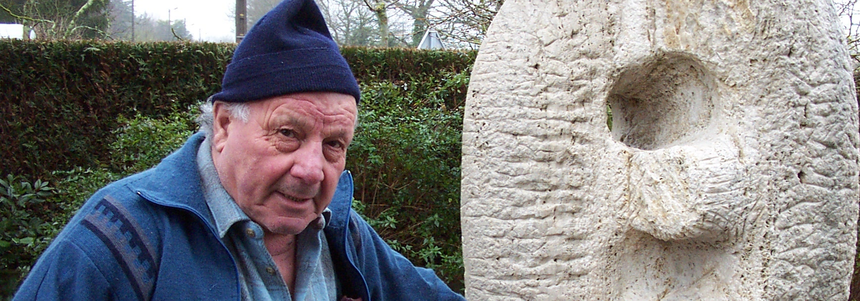 Portrait de Gaetano Di Martino - Sculpture : "La Famille"